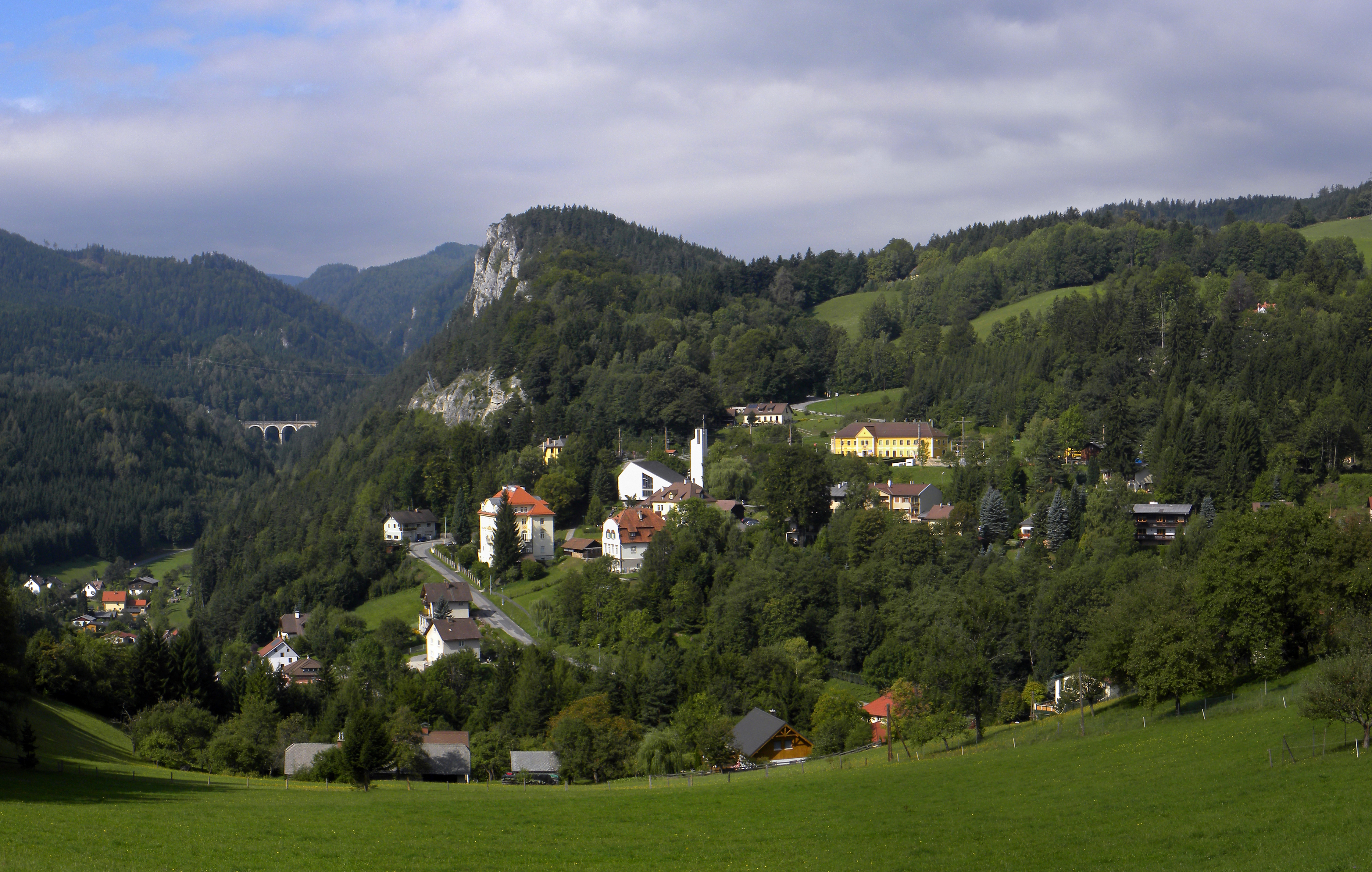 Südbahnstrecke "Semmering-Bahn" (Gloggnitz-Mürzzuschlag)